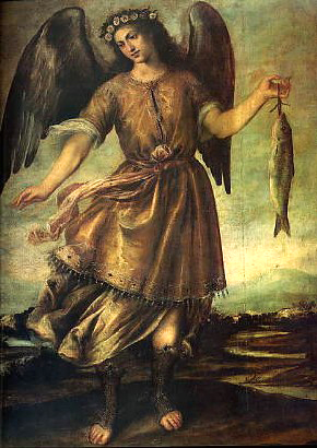 Arcángel San Rafael (antes de 1647, quizá c. 1628), de Bartolomé Román. Pinacoteca de la Iglesia de San Pedro de Lima.